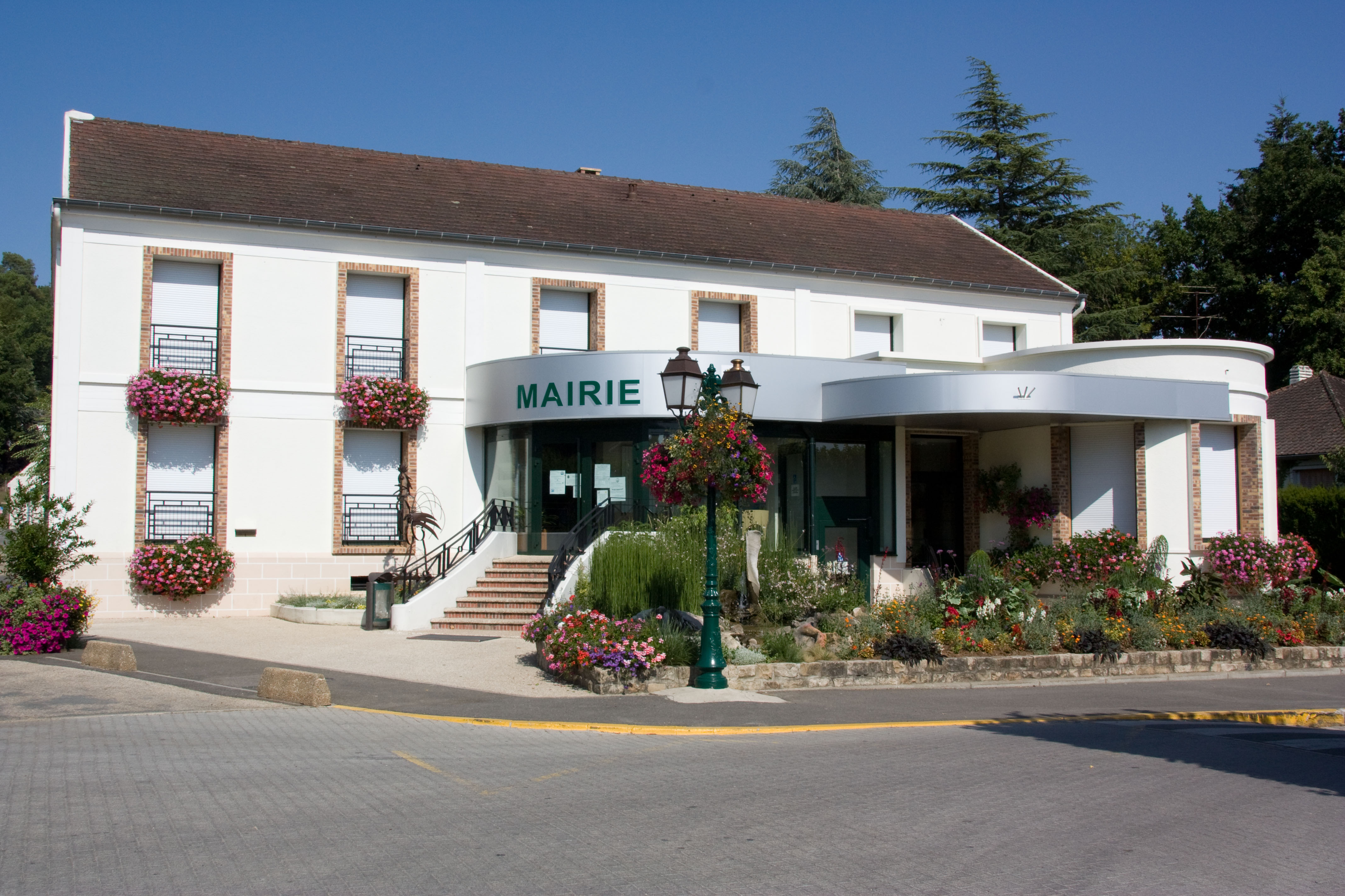 Mairie de Boutigny-sur-Essonne, Boutigny-sur-Essonne, Essonne, France